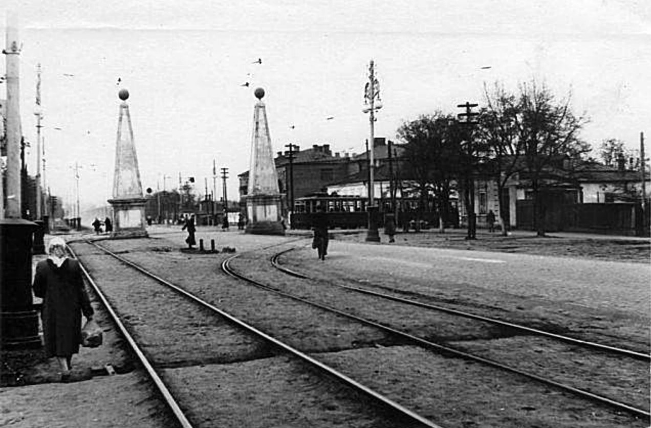 Таганрог. Старый городской шлагбаум. Трамвай выезжает с ул. Дзержинского на ул. Ленина.